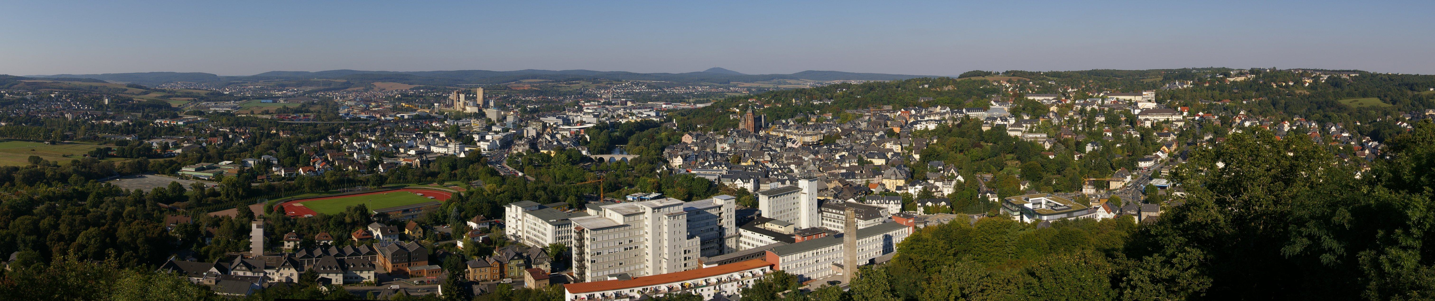 Panorama Wetzlar Hinweis: erstellt mit der freien Version von Autostitch